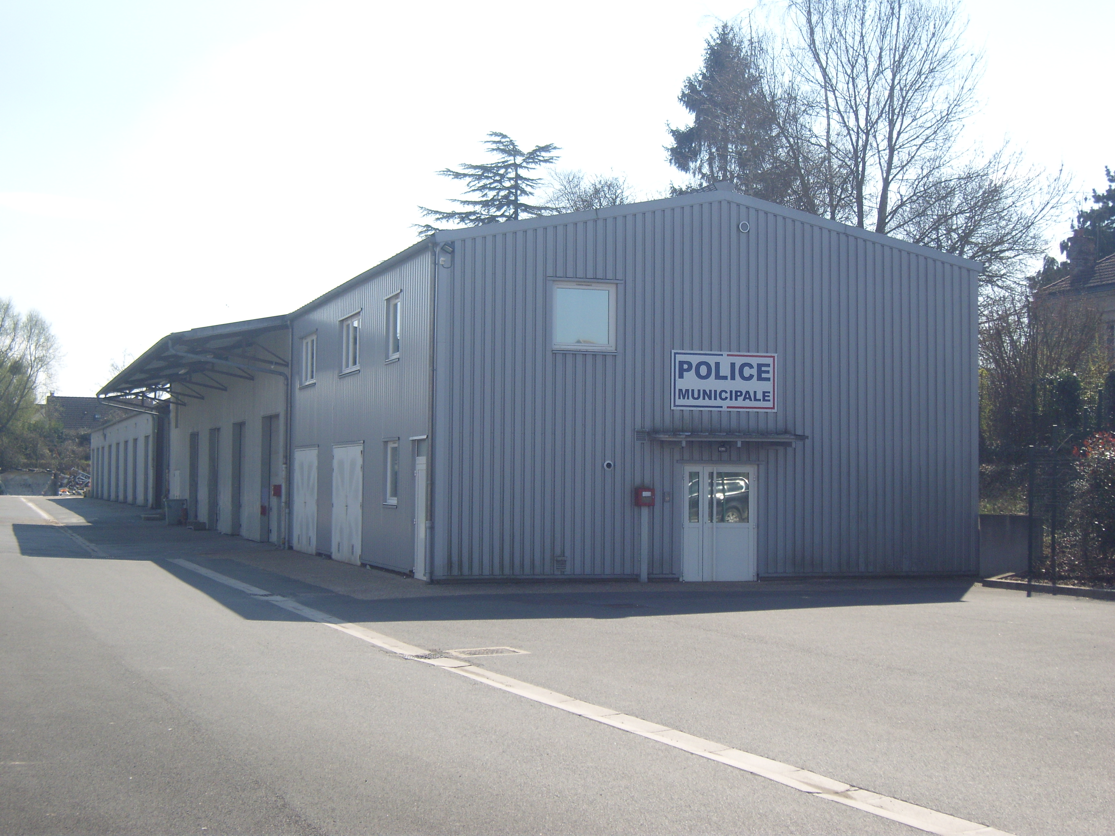 Police municipale et ateliers municipaux